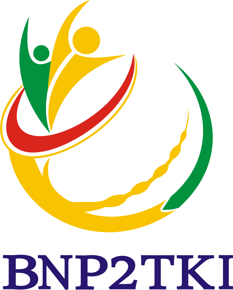 Logo Baru BNP2TKI